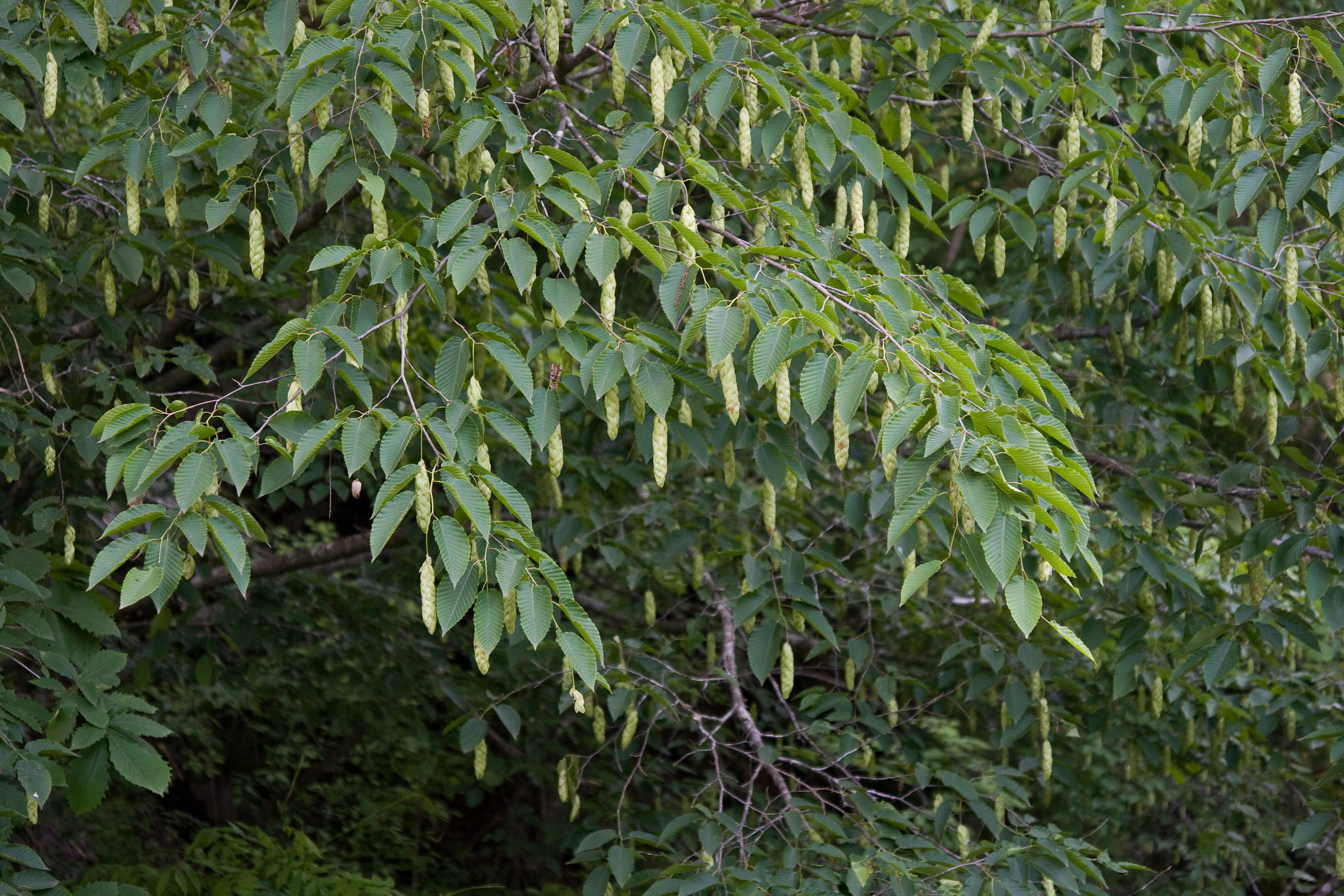 サワシバ (学名:Carpinus cordata)